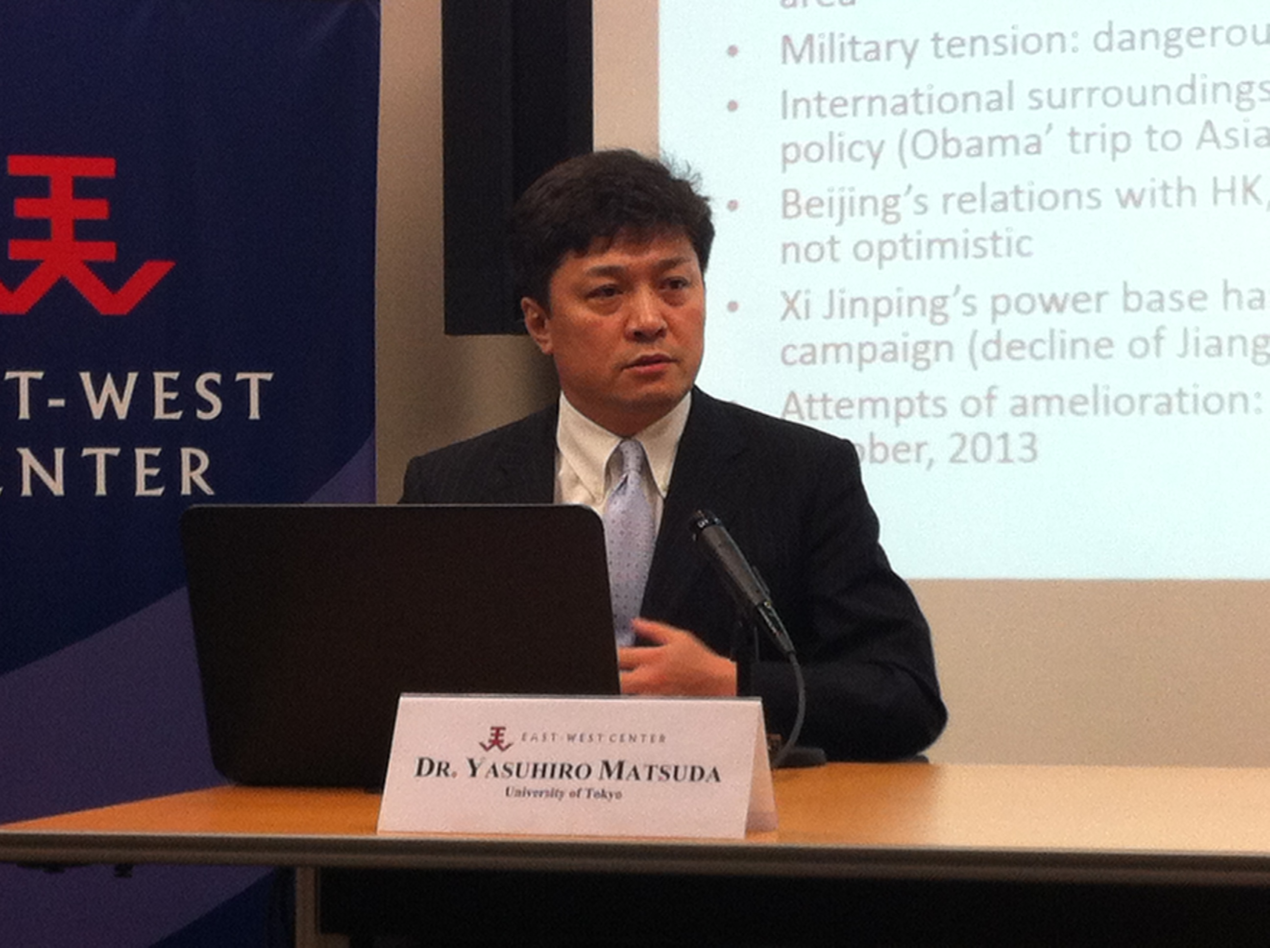 东京大学教授松田康博